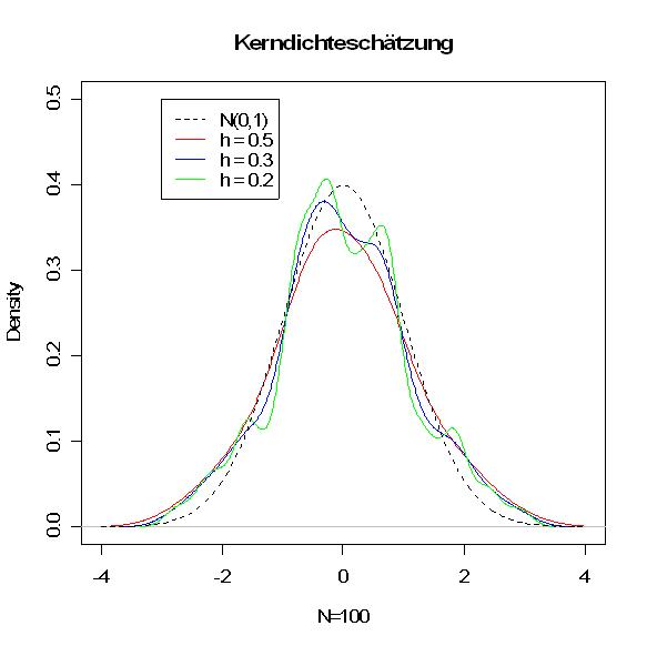 Kerndichteschätzer